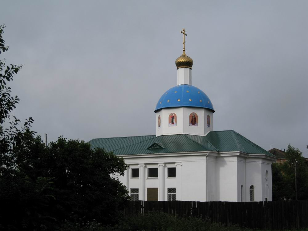 Храм рождества Христова в переоборудованном здании кинотеатра «Шахтёр», г. Сафоново